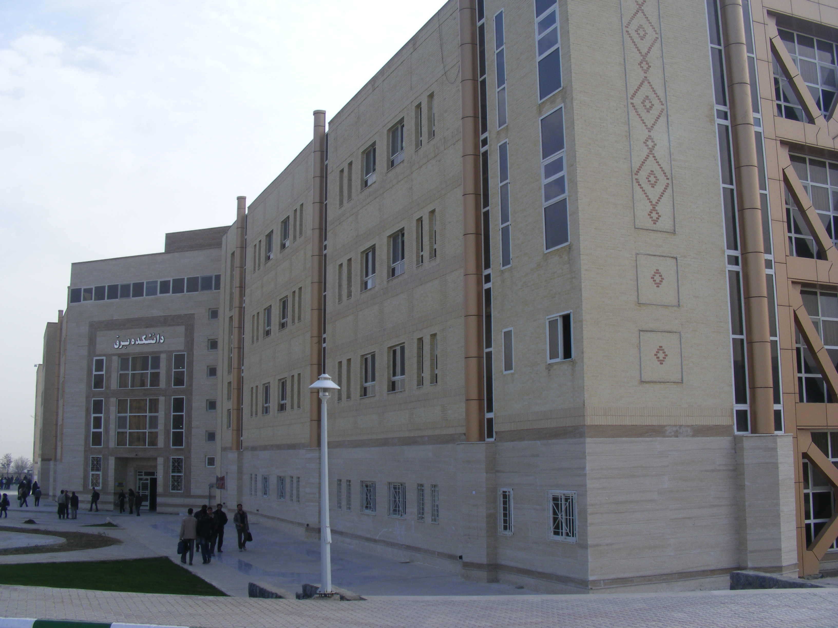 دانشکده برق